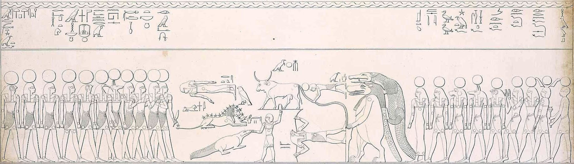 Partie du plafond de la tombe de Séthi Ier